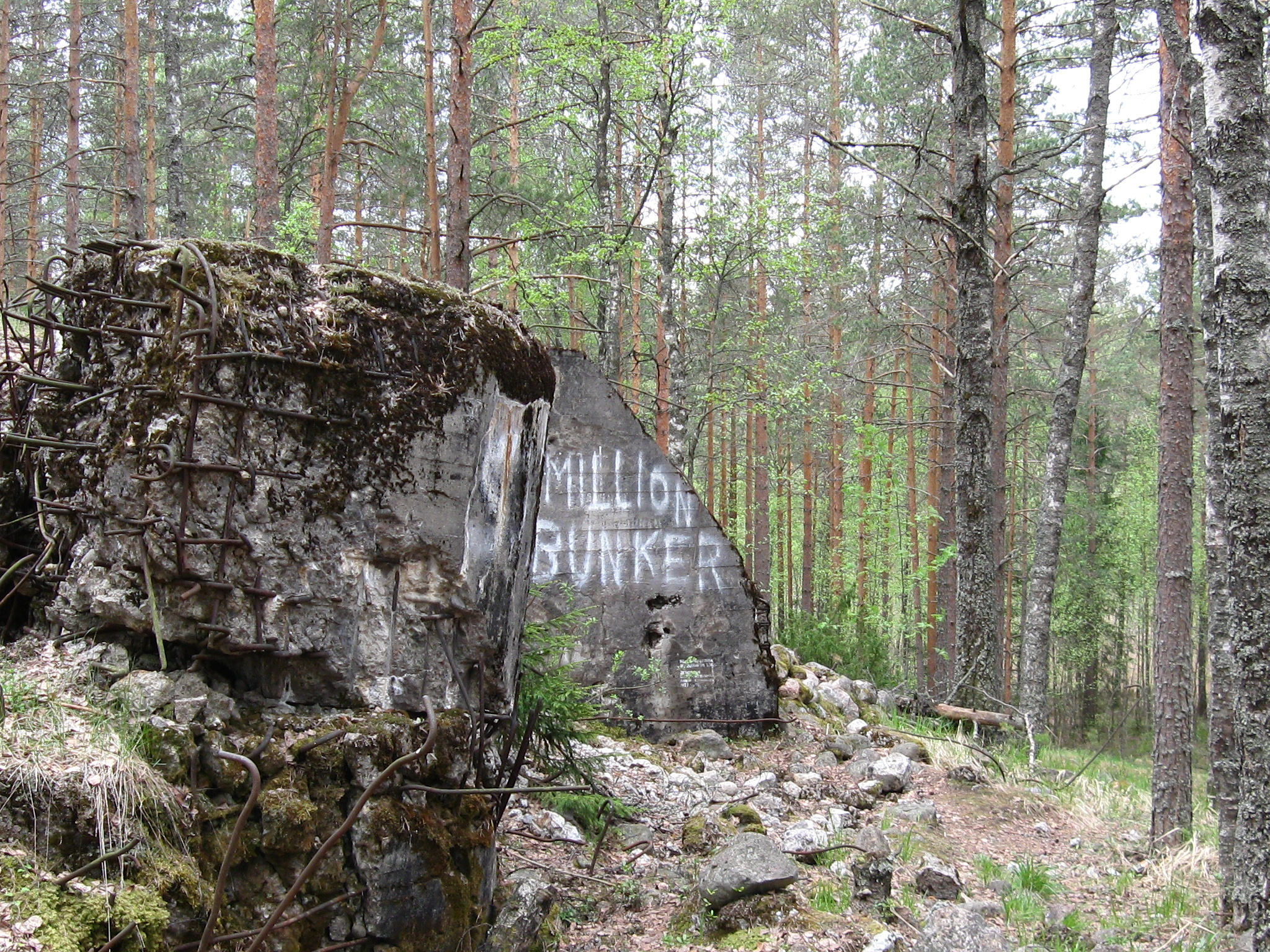 Форт SJ-5 на высоте "Язык", один из фортов на участке прорыва Линии Маннергейма.